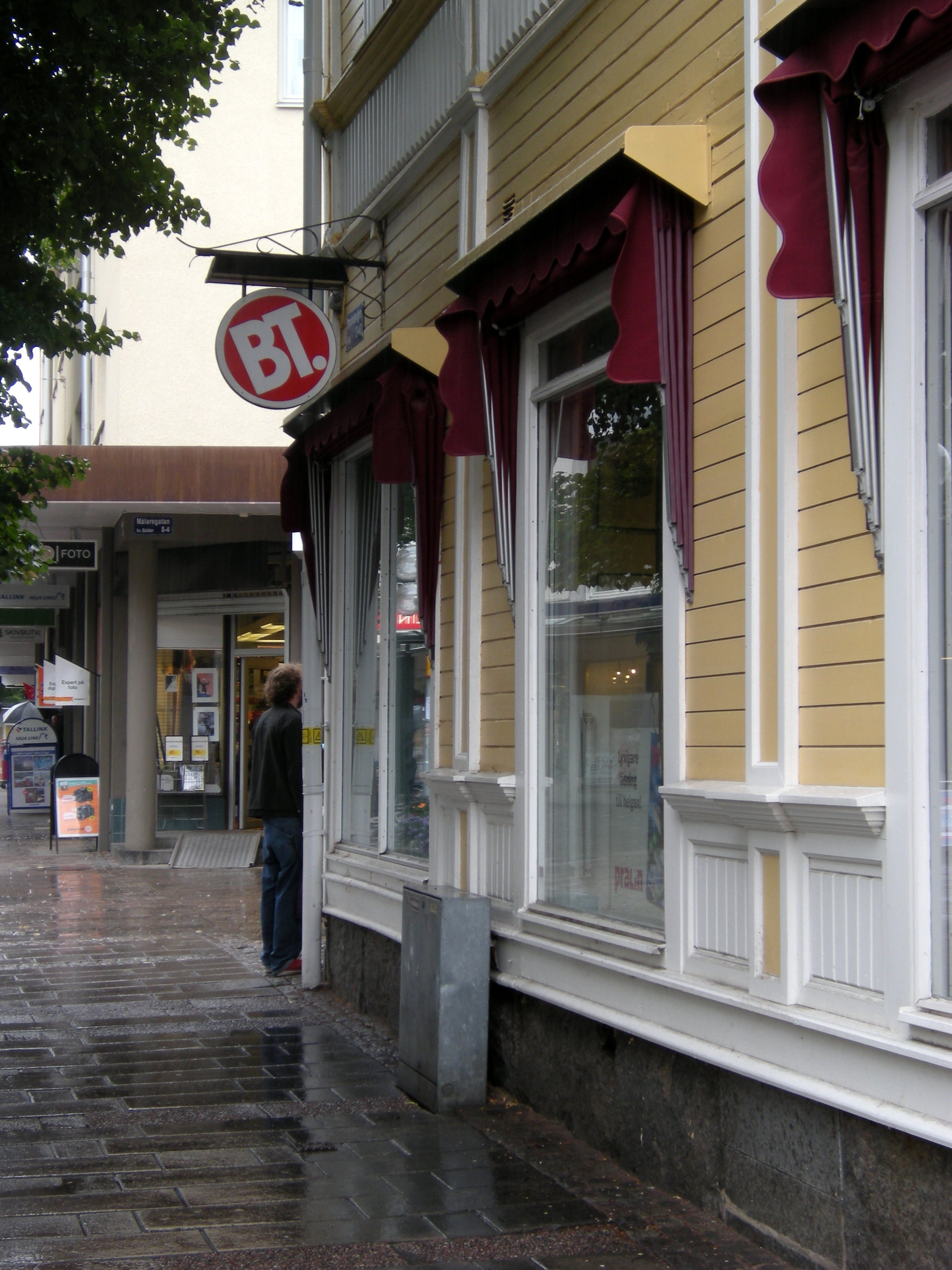 Borlänge tidning, Borlänge.